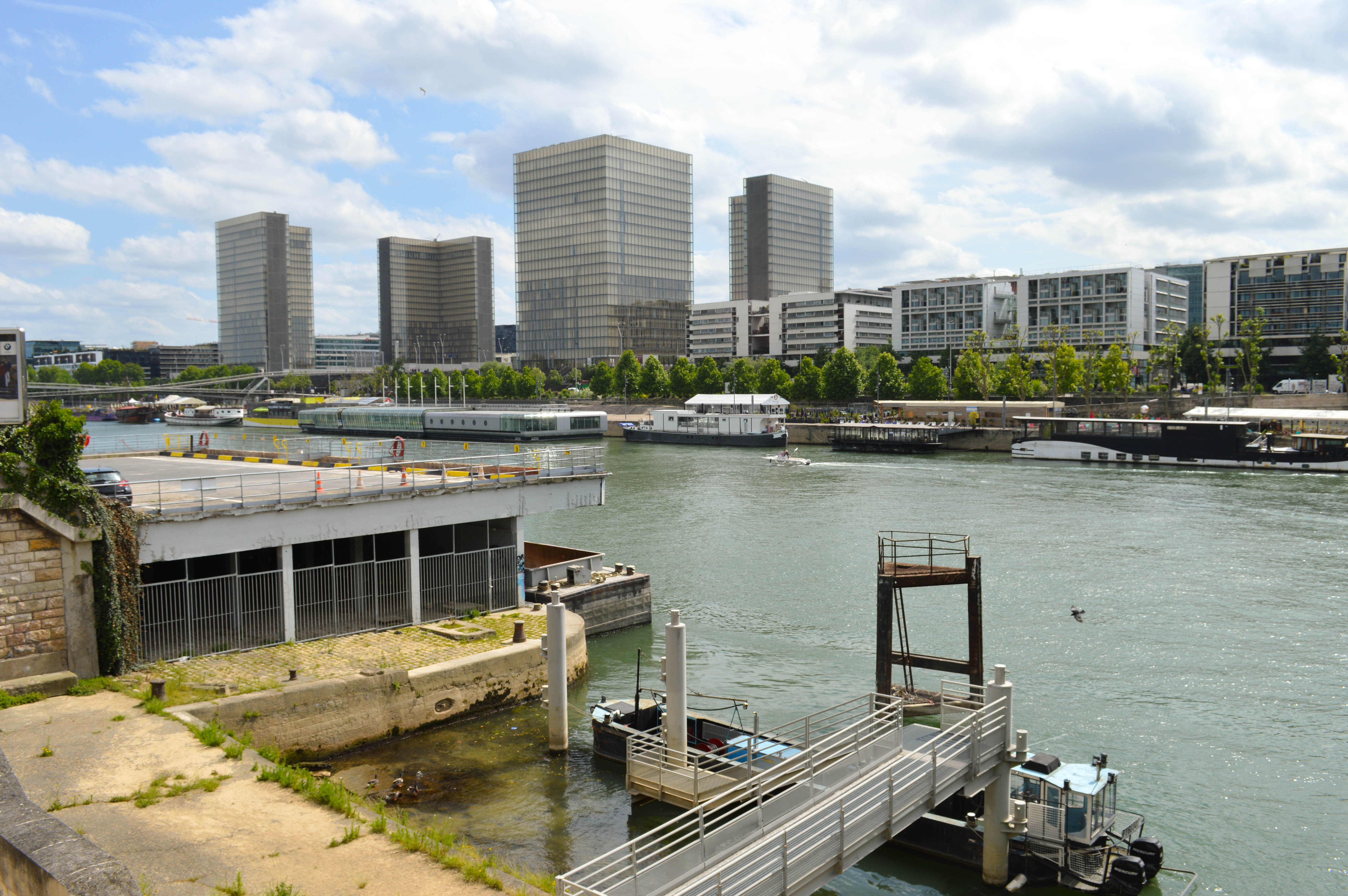 Quai de Bercy, Paris.